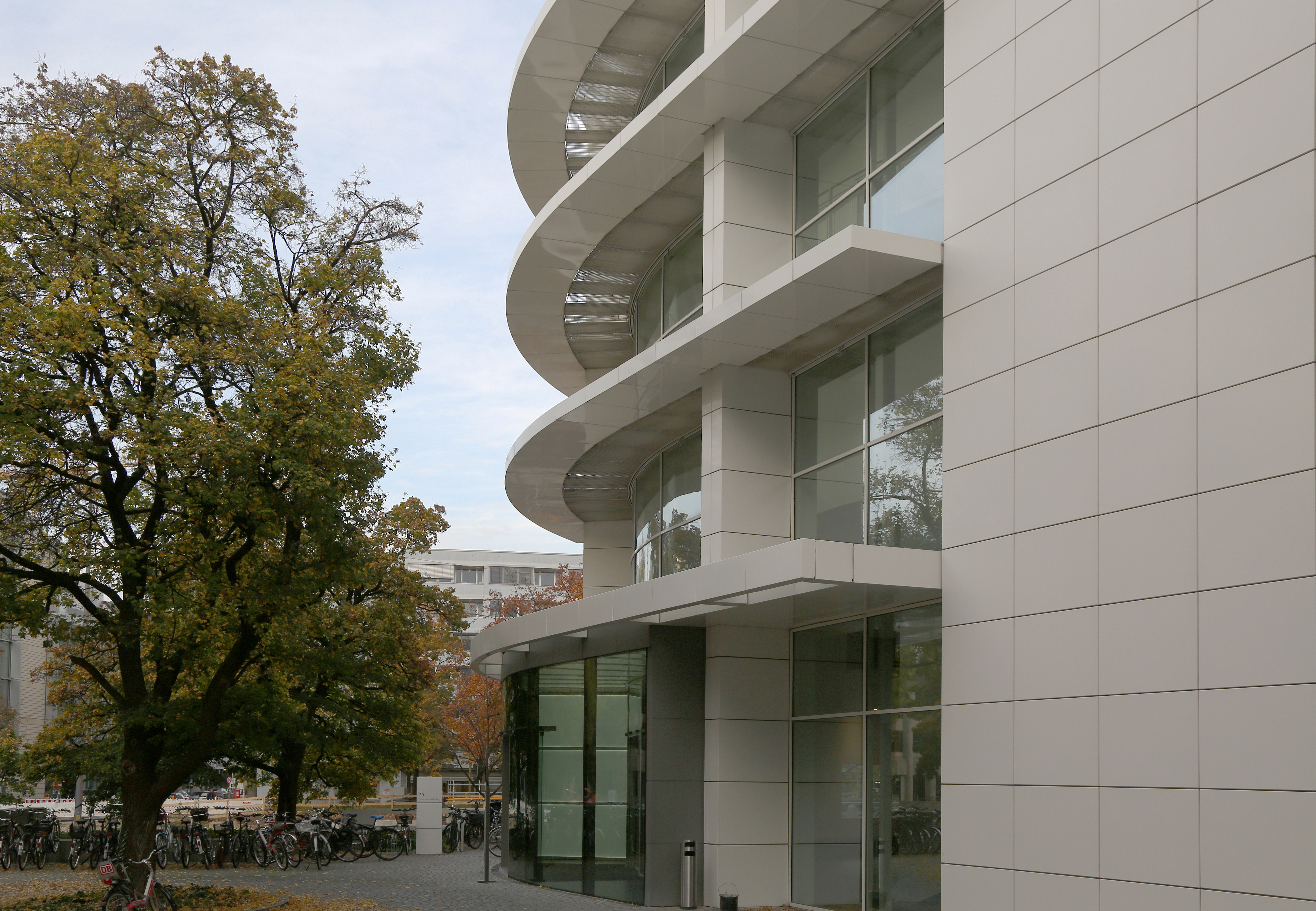 Oskar-von-Miller-Ring 20 , München. Ein Bürogebäude von Architekt Richard Meier aus dem Jahr 1999. Ursprünglich für die Siemens AG errichtet, im Jahr 2019 Sitz von Conde-Nast, Amazon Web Services und WeWorks. Das Bild zeigt einen gebogenen Schild, der die Eingangsrotunde umschließt.